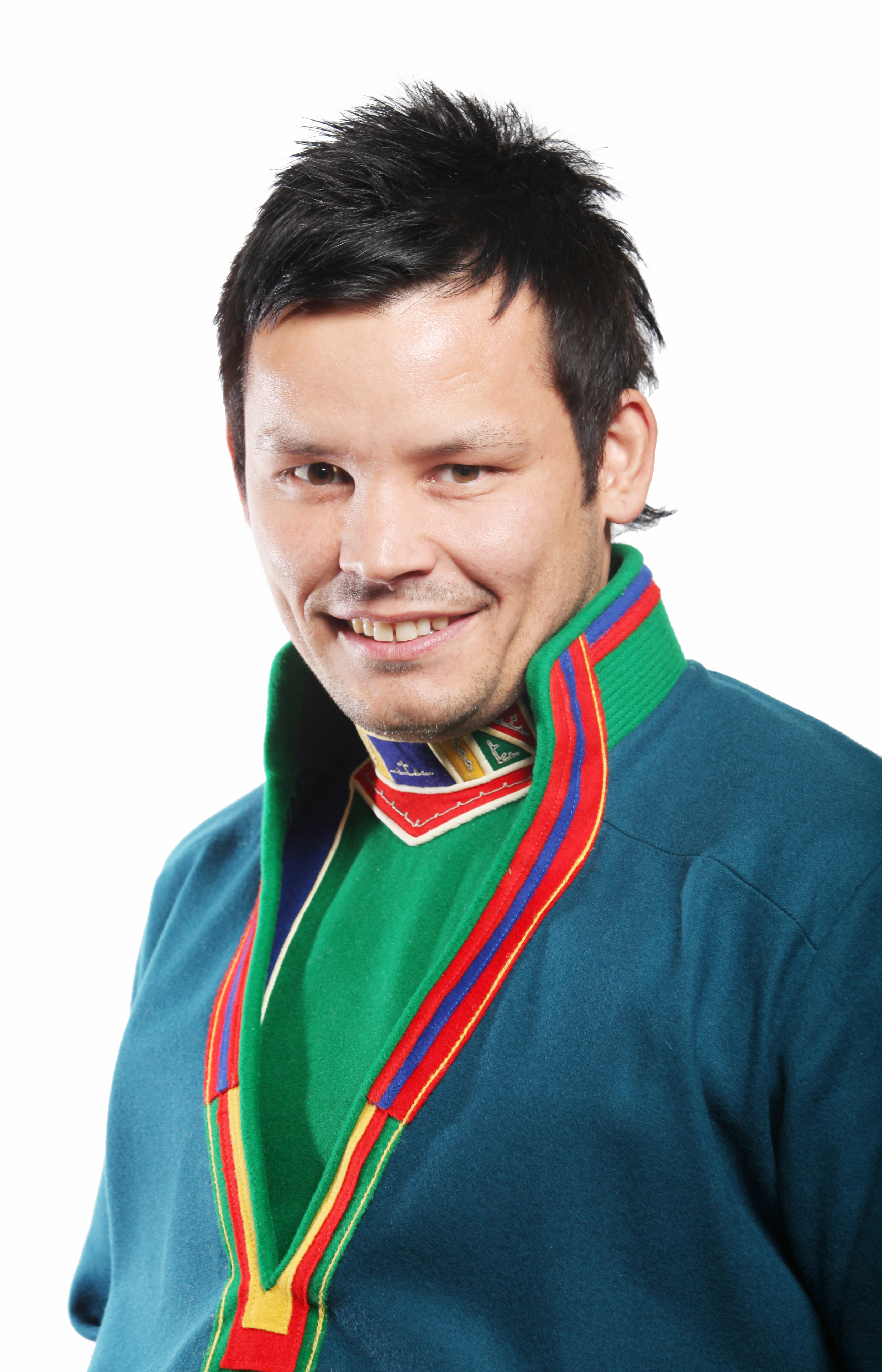 Medlem av valgkomitéen og oppvekst-, omsorg- og utdanningskomitéen. Foto: Kenneth Hætta / Sametinget.